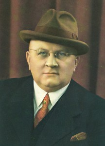 Josef Volman (1883 - 1943), Český podnikatel.